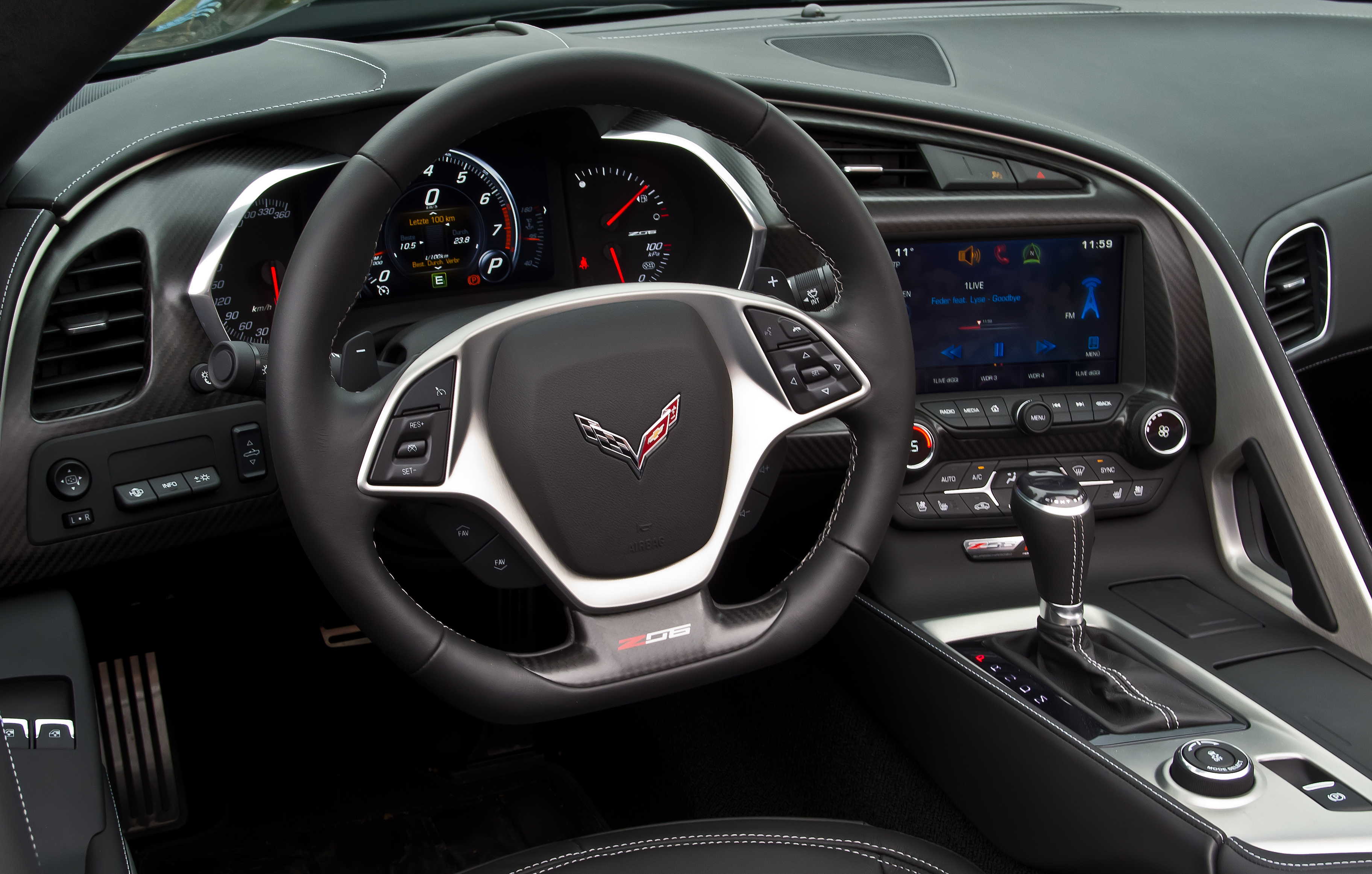 Corvette Z06 Cabriolet (C7)